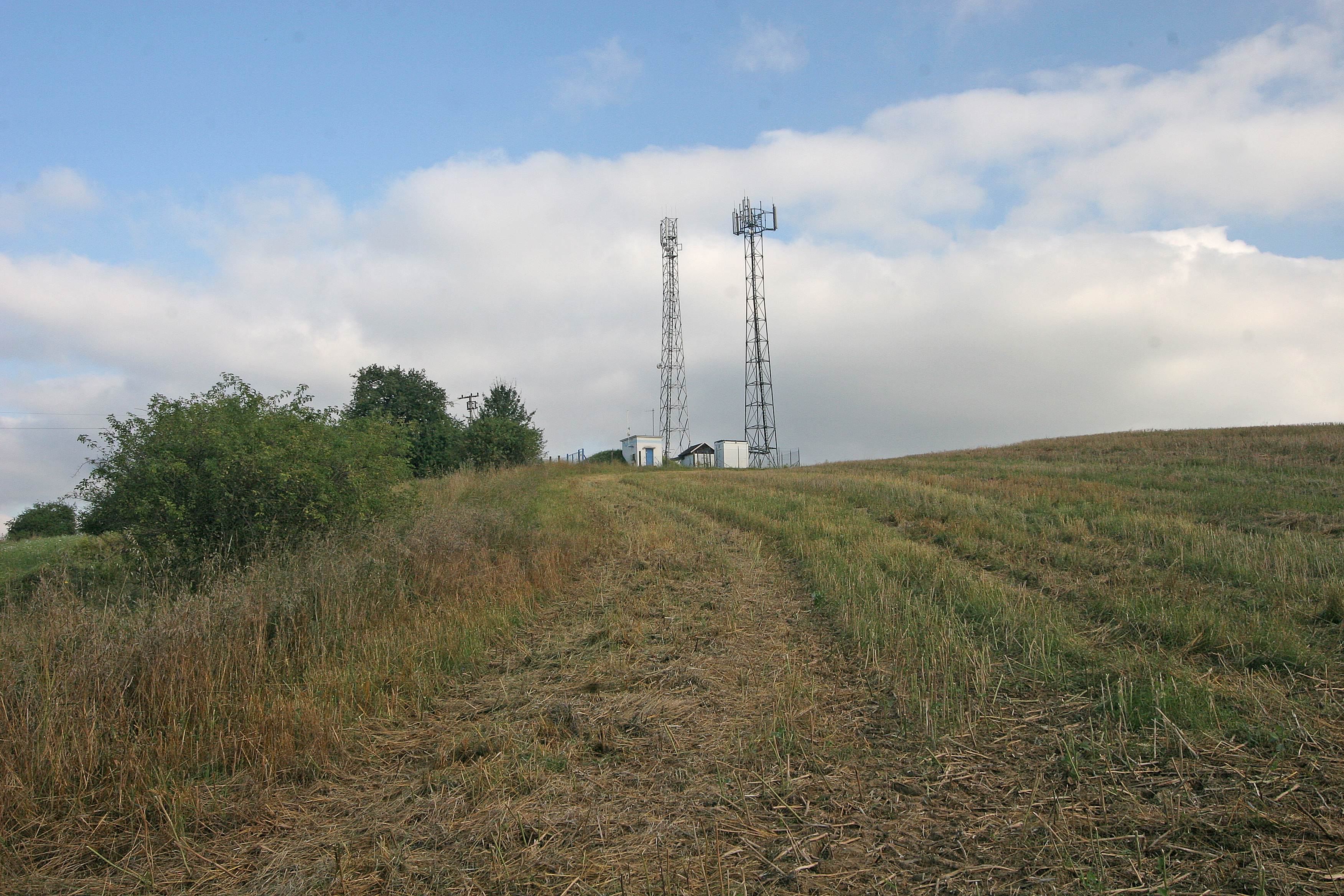 Velký Hubenov - Strážný vrch